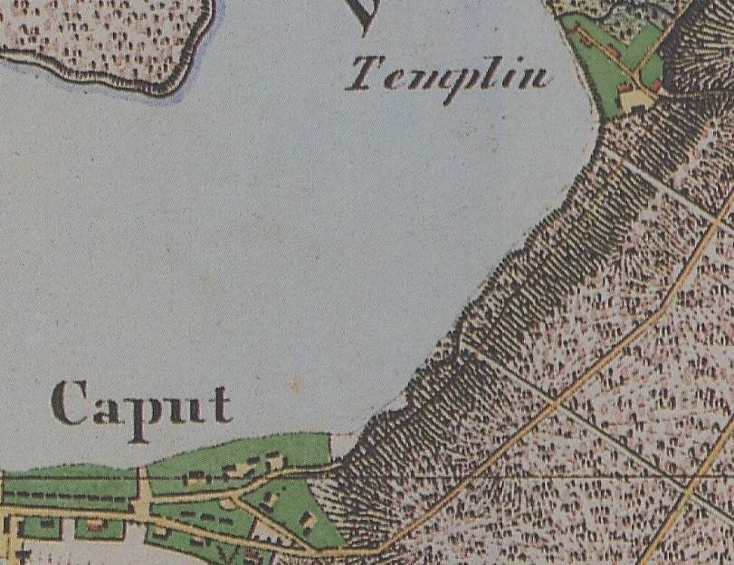 Templin, Ortslage in der Landeshauptstadt Potsdam, Brandenburg, Ausschnitt aus dem Urmesstischblatt 3644 Potsdam von 1835